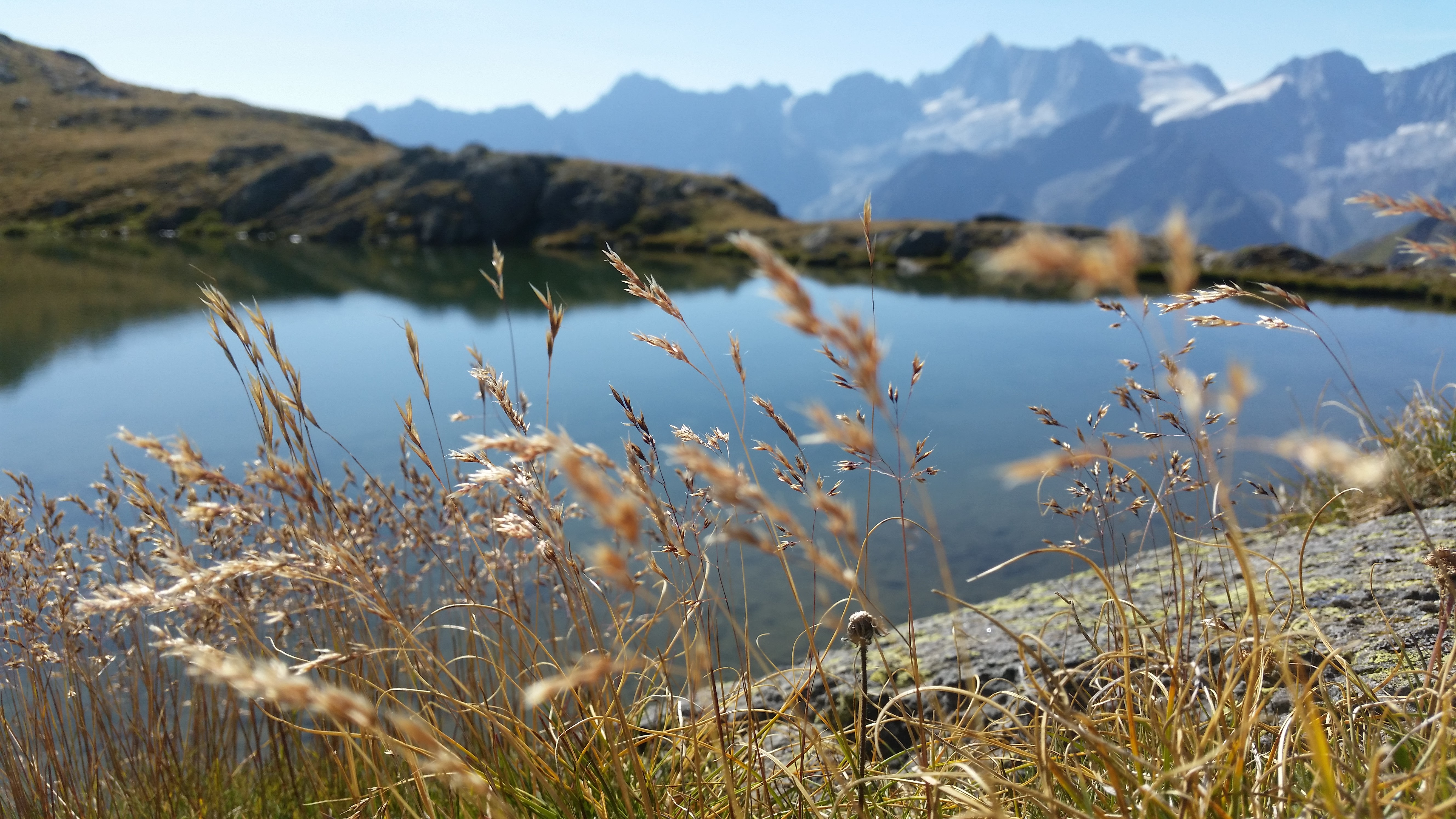 Vermiglio - Folgarida (Q49967600)